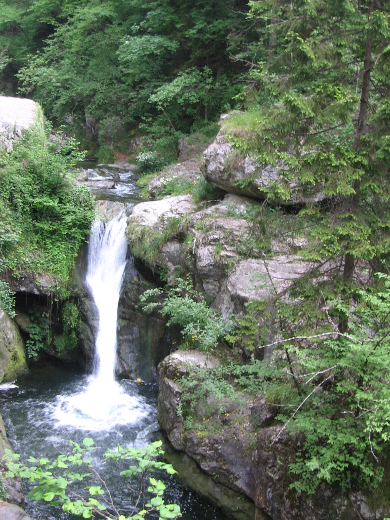 torrente Serina (Algua), Bergamo, Italia